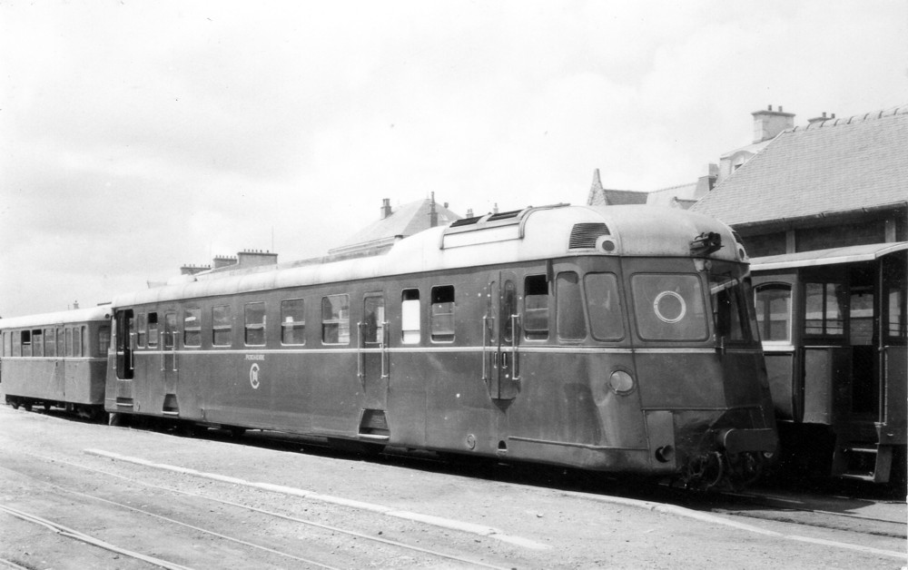 Autorail Renault type ABH6 du Chemins de fer des Côtes-du-Nord à Paimpol